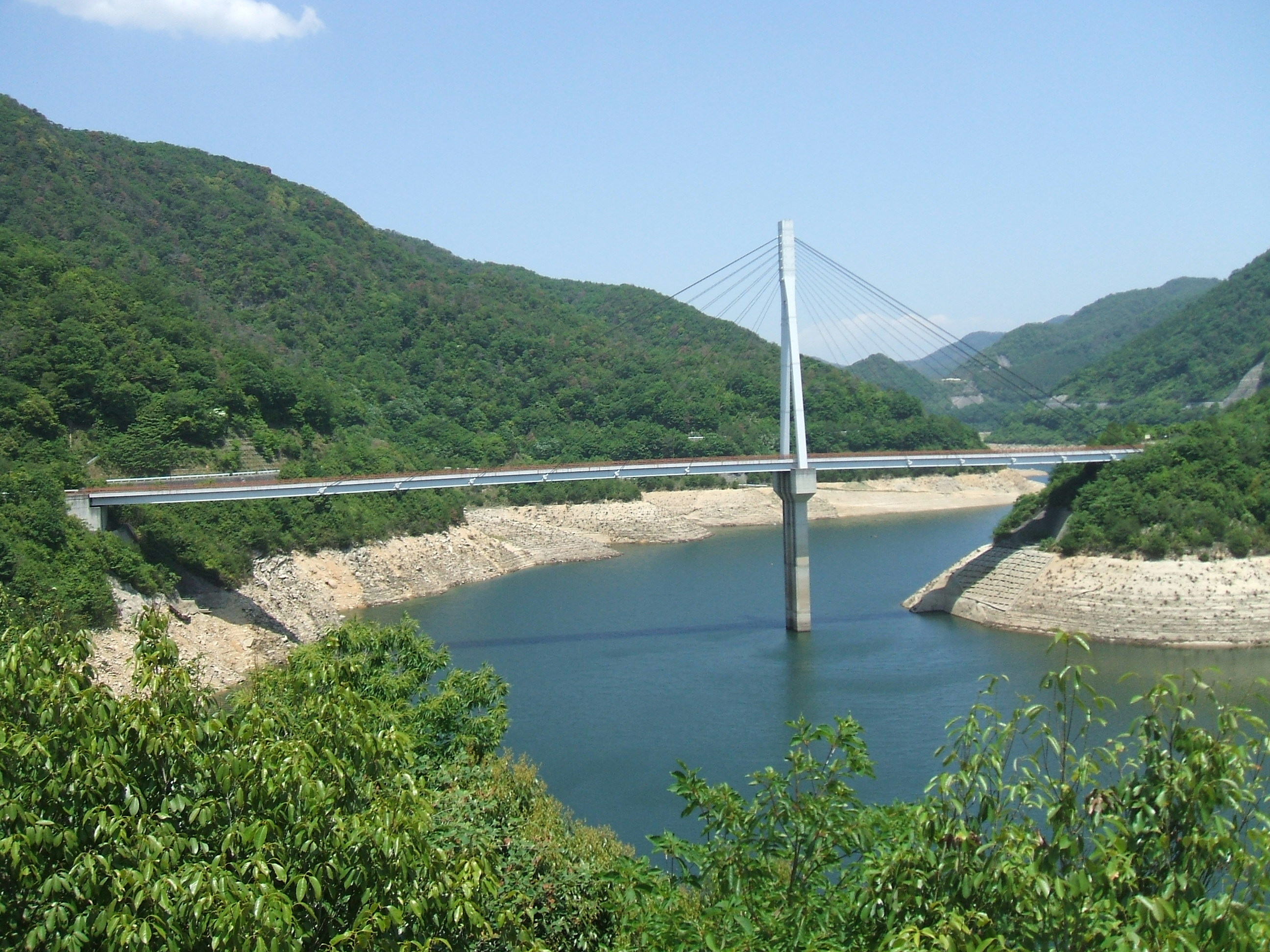 広島県にある八田原大橋